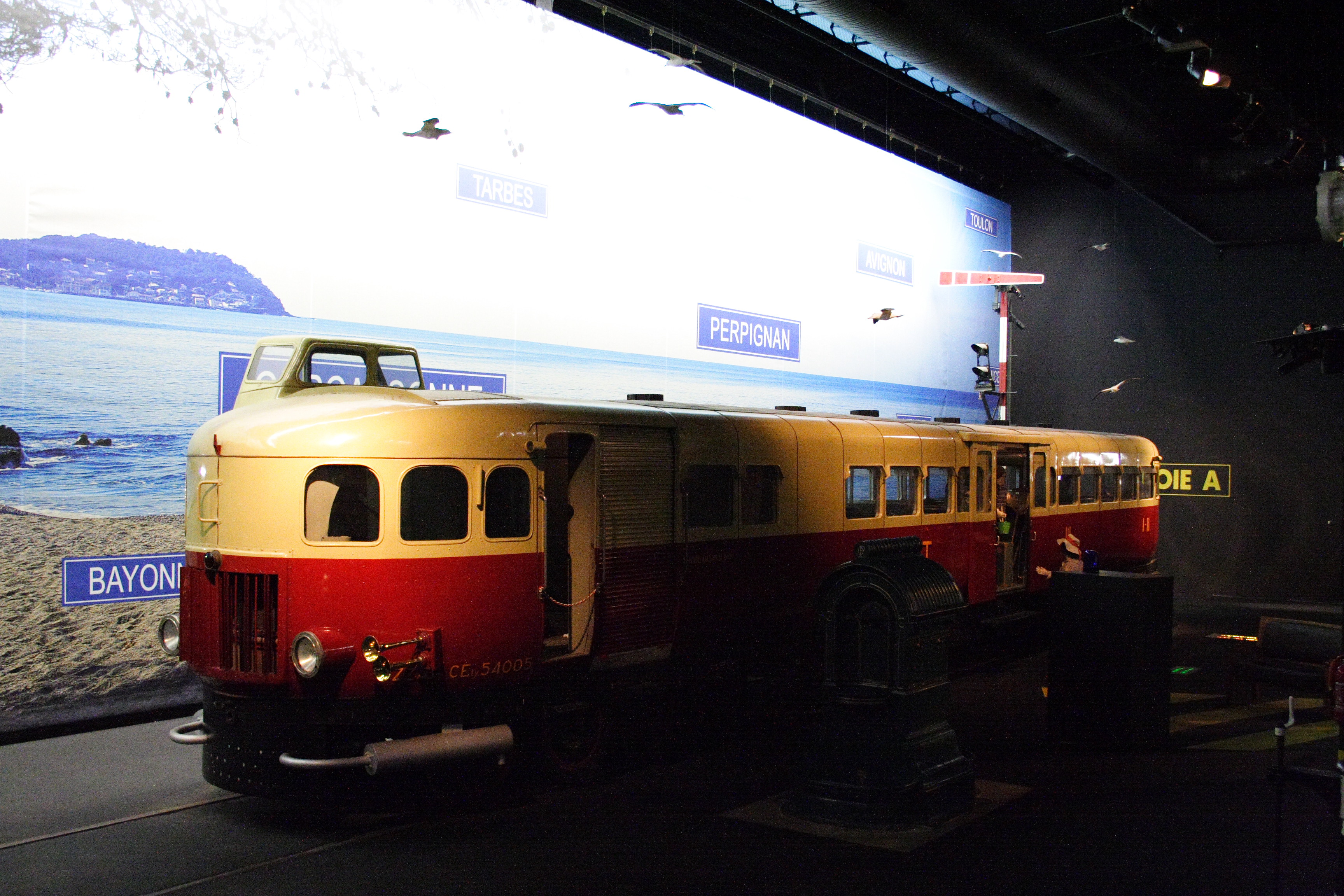 an autorail Micheline at Cité du Train de Mulhouse(Mulhouse, France)